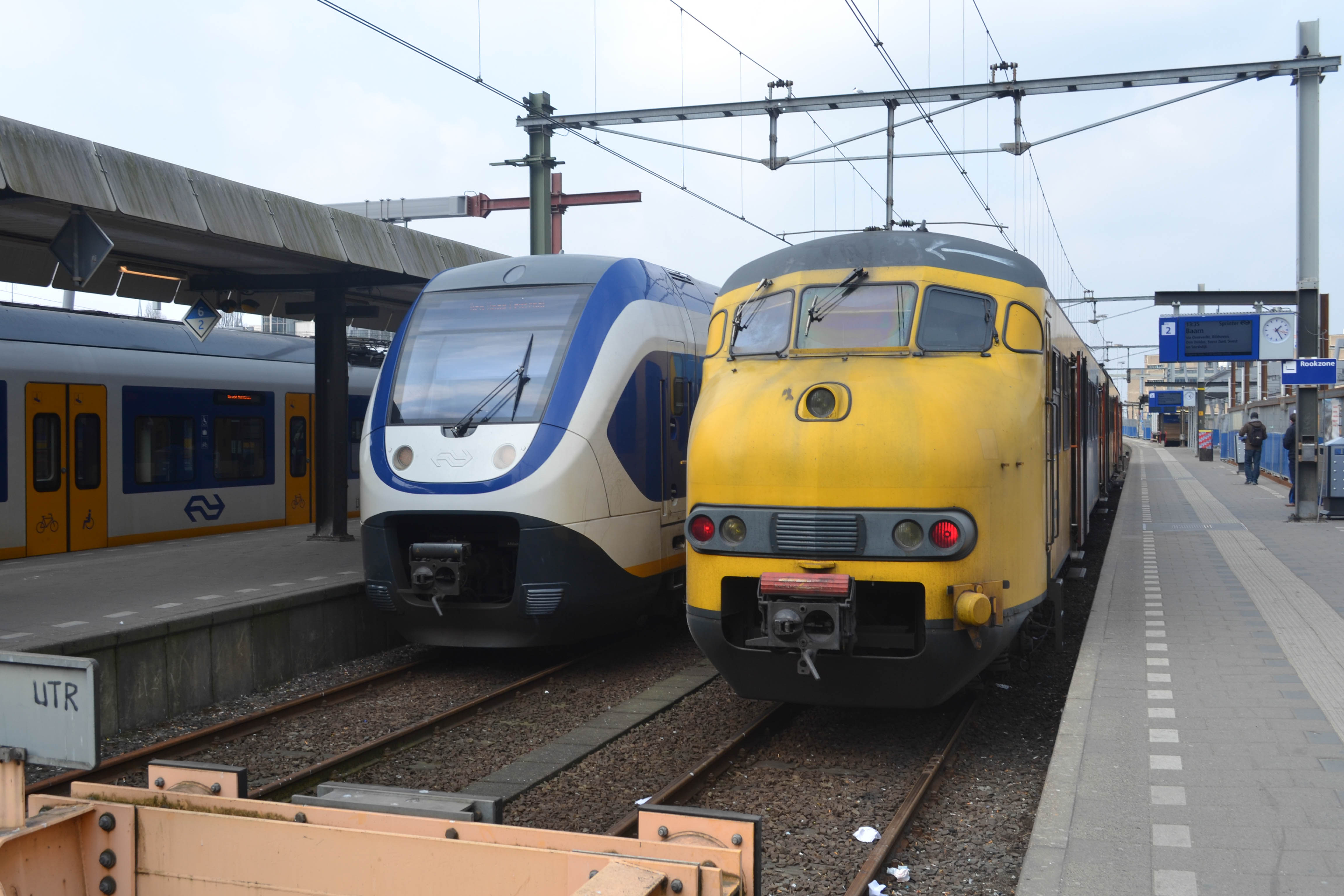 Jong vs Oud, Antiek vs Modern, jaren '60 vs generation '10. SLT en Plan V op de buurtspoorperrons te Utrecht Centraal.